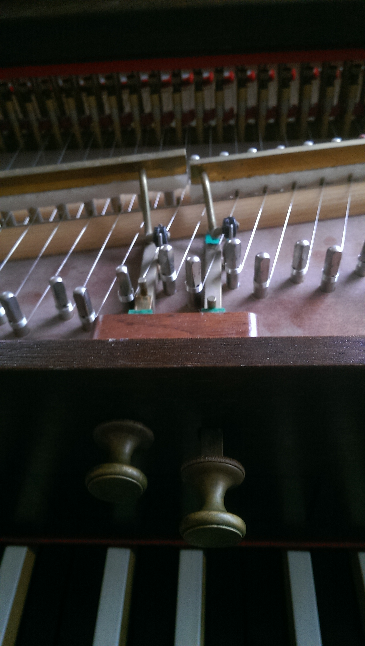 Lautenzug beim Cembalo: Der rechte ist aktiviert